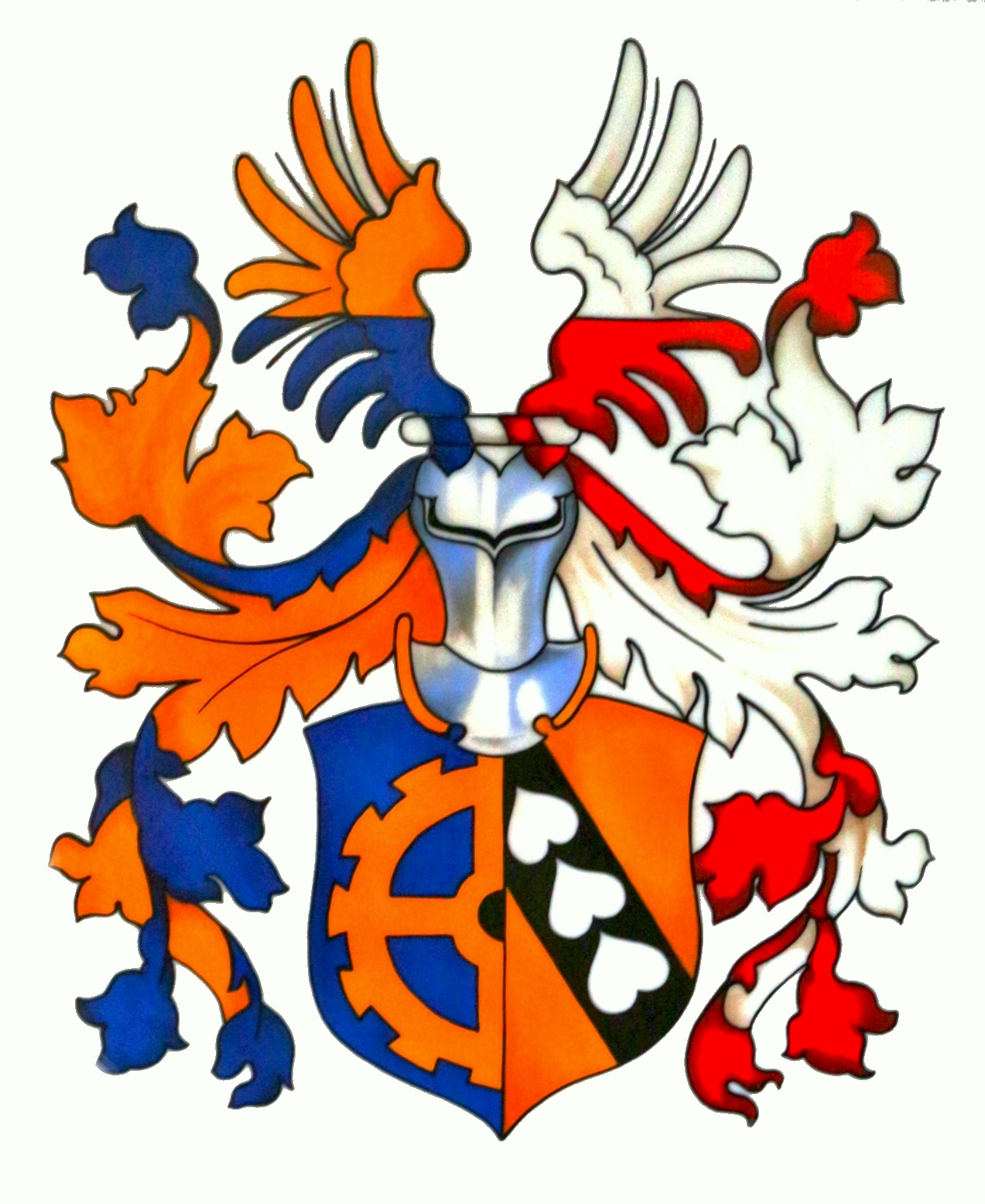 Erb rodu Milnerů z Milhauzu (a na Mimoni)